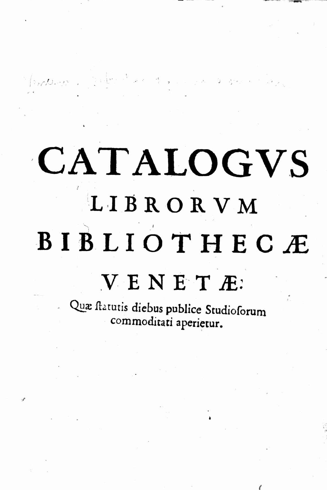 Frontespizio